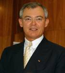 BGA Präsident A.F. Börner